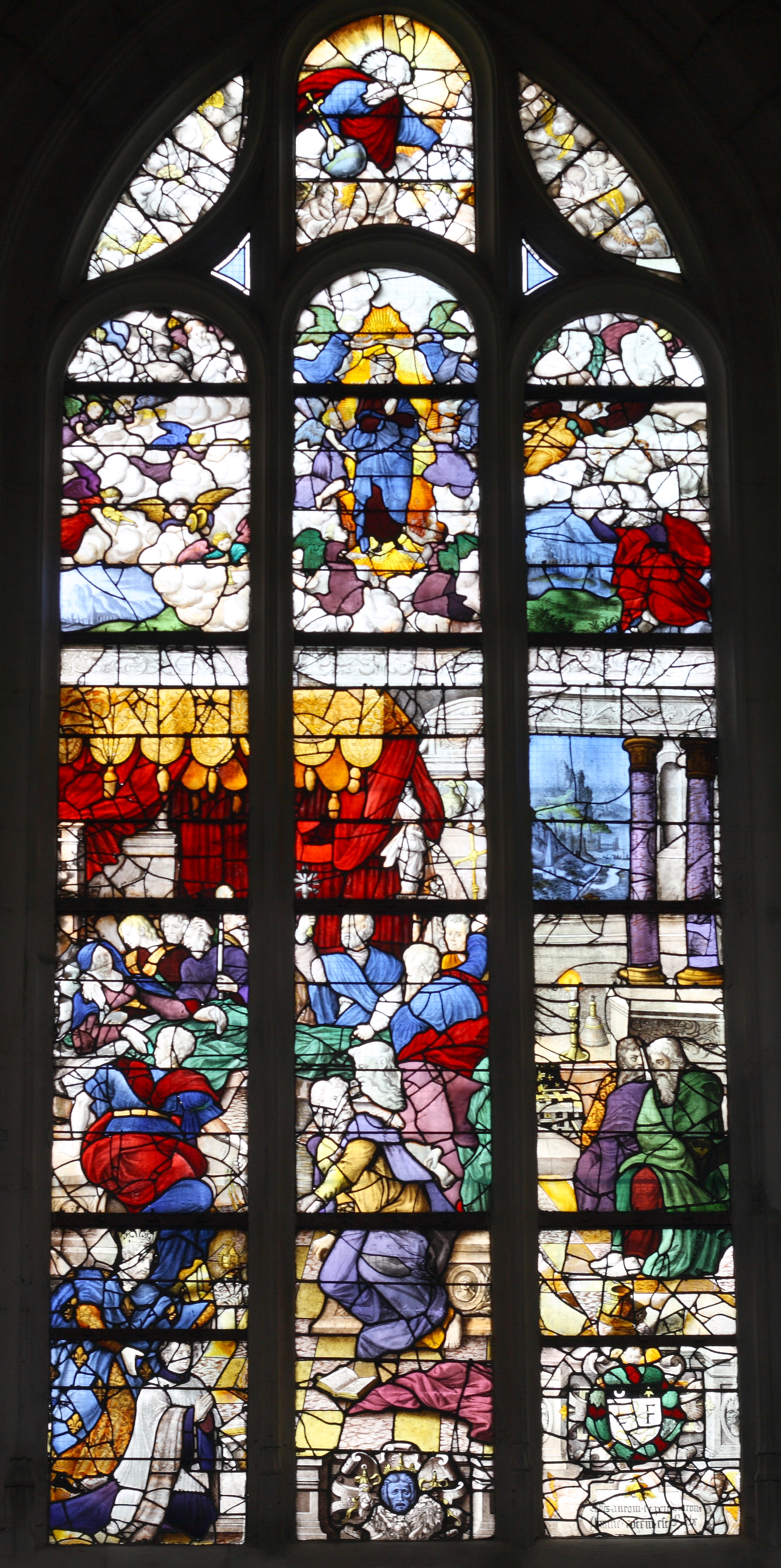 Bleiglasfenster (Fenster Nr. 7) in der katholischen Pfarrkirche Saint-Acceul in Écouen, "Vitrail de la Dormition", um 1544 (siehe Mathieu Lours: Saint-Acceul d'Écouen. Une cage de verre en pays de France, éditée par l’Association Les Amis de Saint-Acceul)